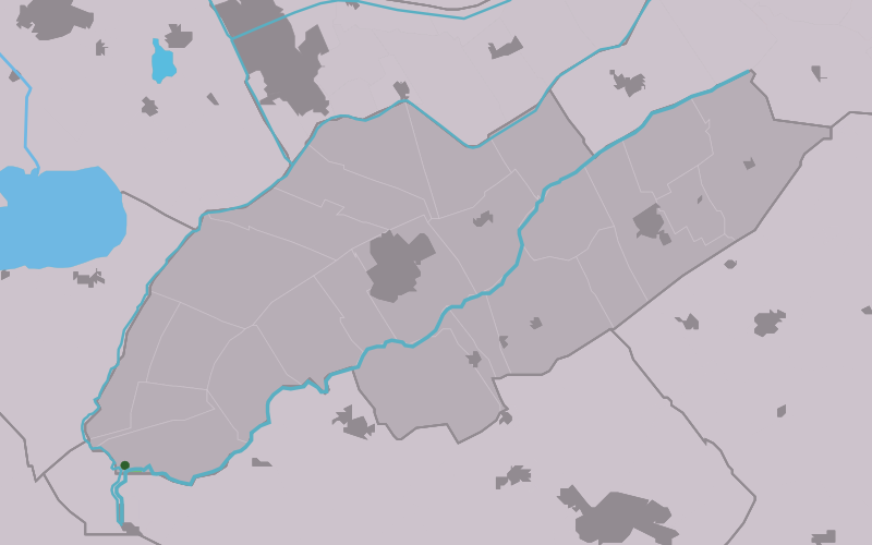 Kaartsje fan himrik fan Slikenboarch